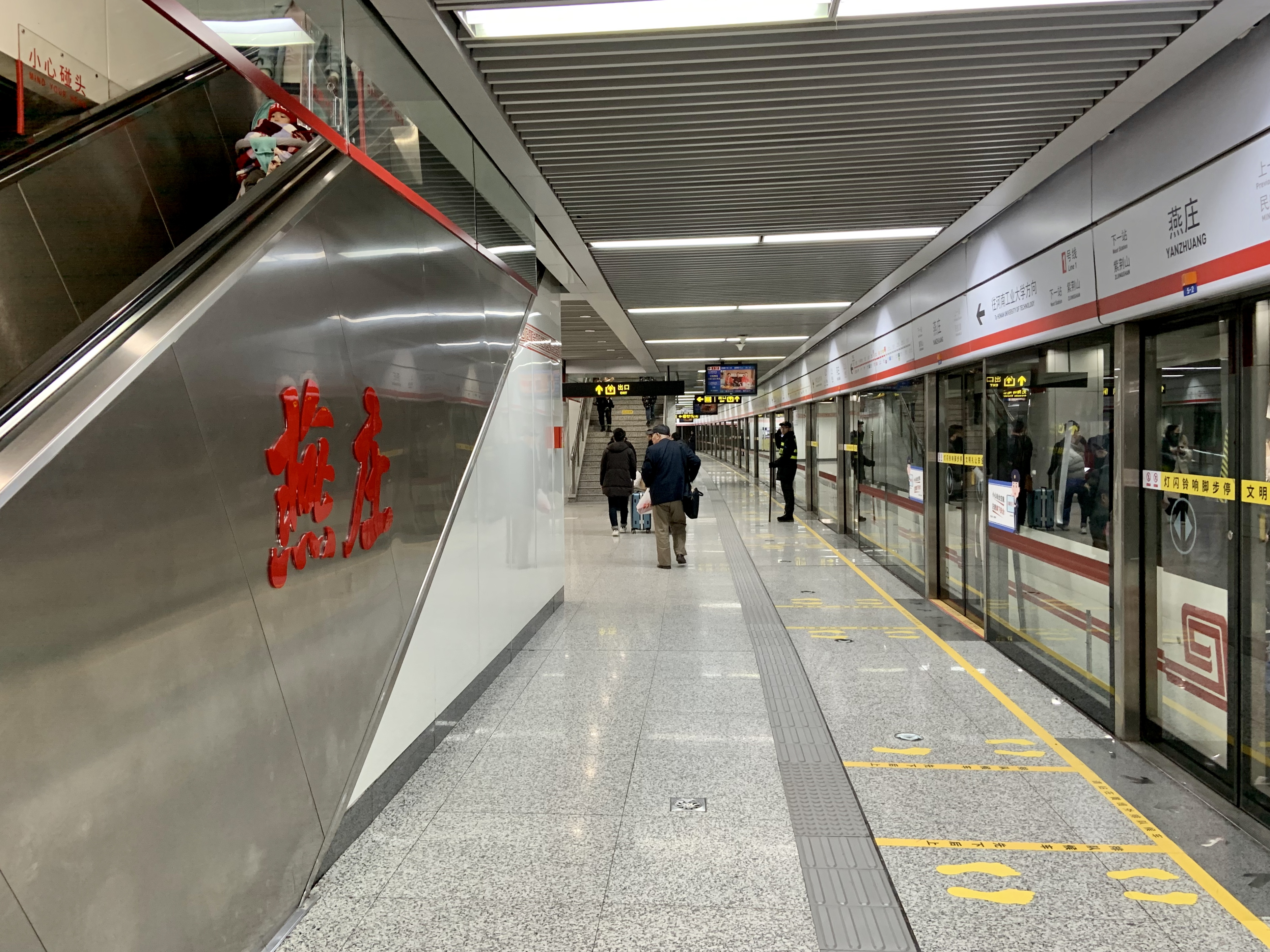 郑州地铁燕庄站